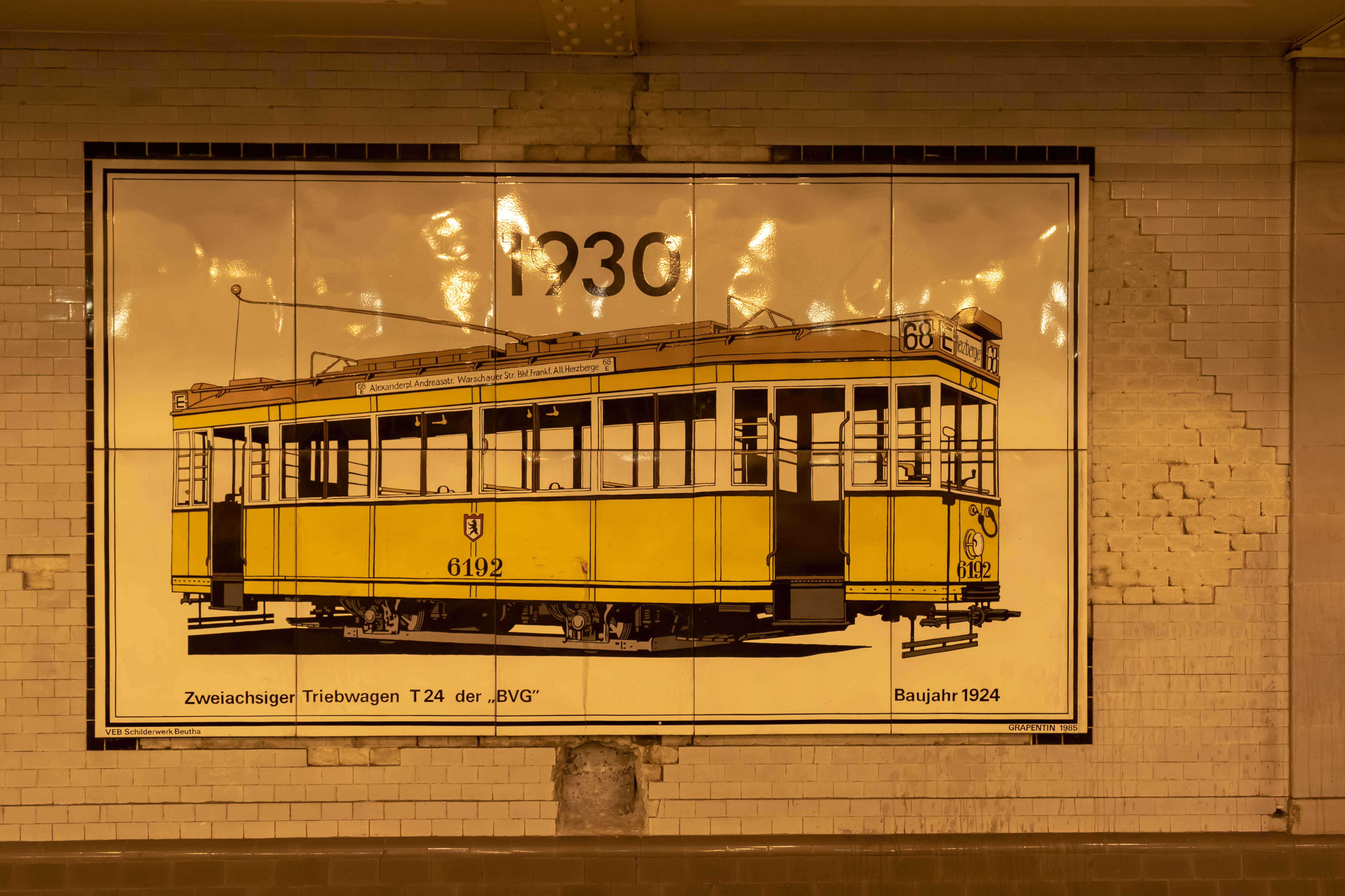 Abbildung des Tw 6192 (Typ T 24) im Zustand von 1930 im U-Bahnhof Klosterstraße.